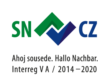 Logo des Förderprogrammes